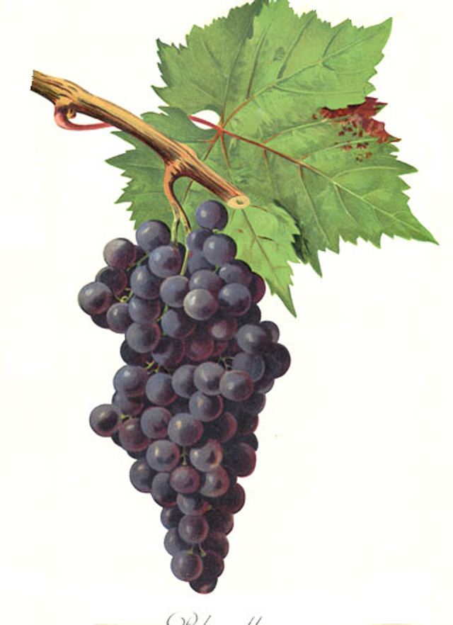 Grappe de Blavette par Viala et Vermorel